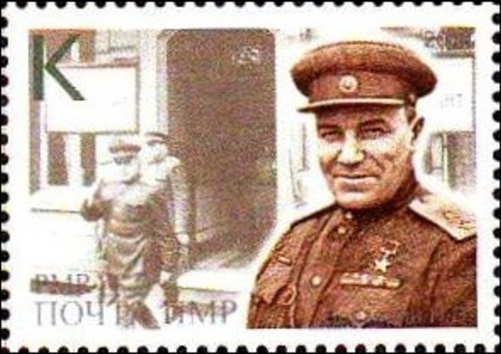 Nikolai Berzarin